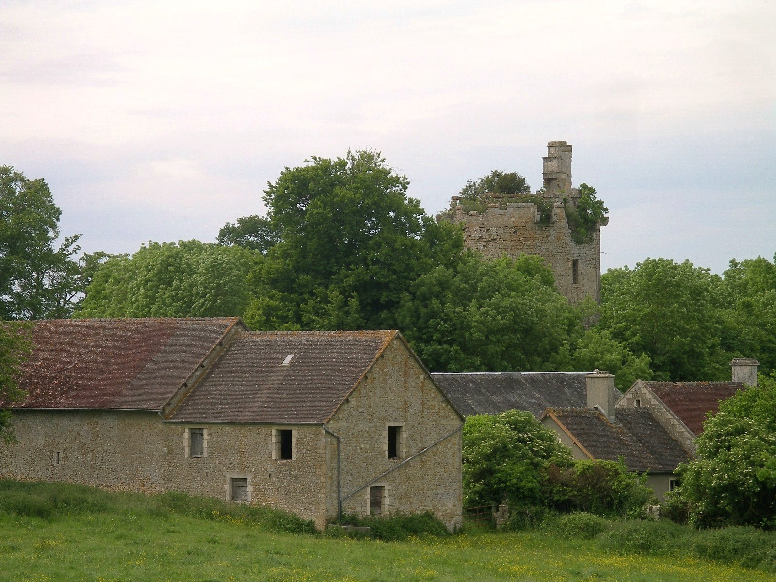 Château Fort dit Donjon de Tournebu (Calvados)